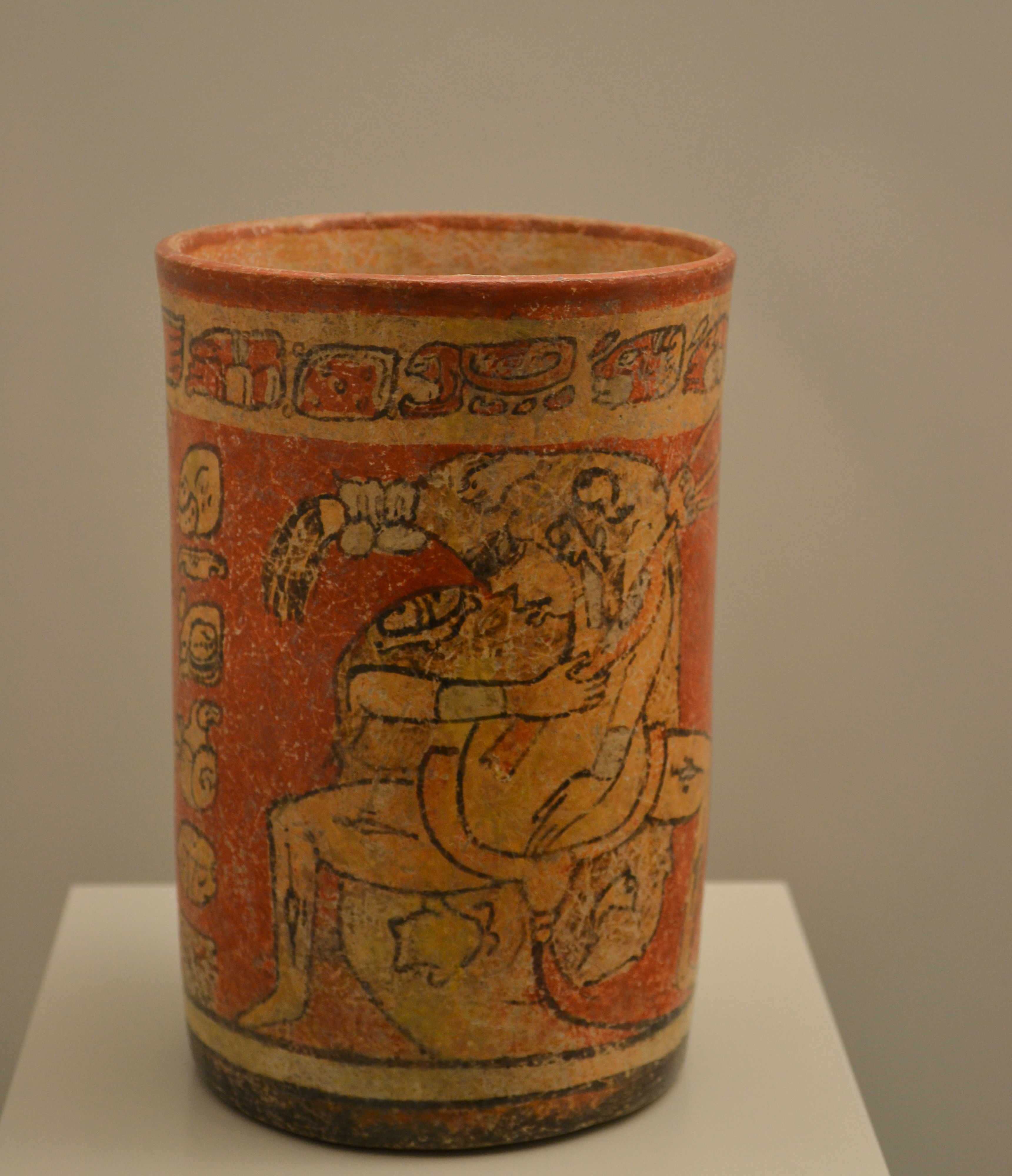 Vaso ceremonial maya con escena mitológica. 600-900 d. C. Periodo maya clásico tardío. En la parte central aparece representada una escena en la que participan un jaguar con las garras extendidas, un venado con las garras de un jaguar y una figura humana cubierta con una piel de venado y cicatrices en las piernas, que abraza a un rostro antropomorfo. Procedencia: Guatemala. Nº inv. 1991/11/10. Museo de América.